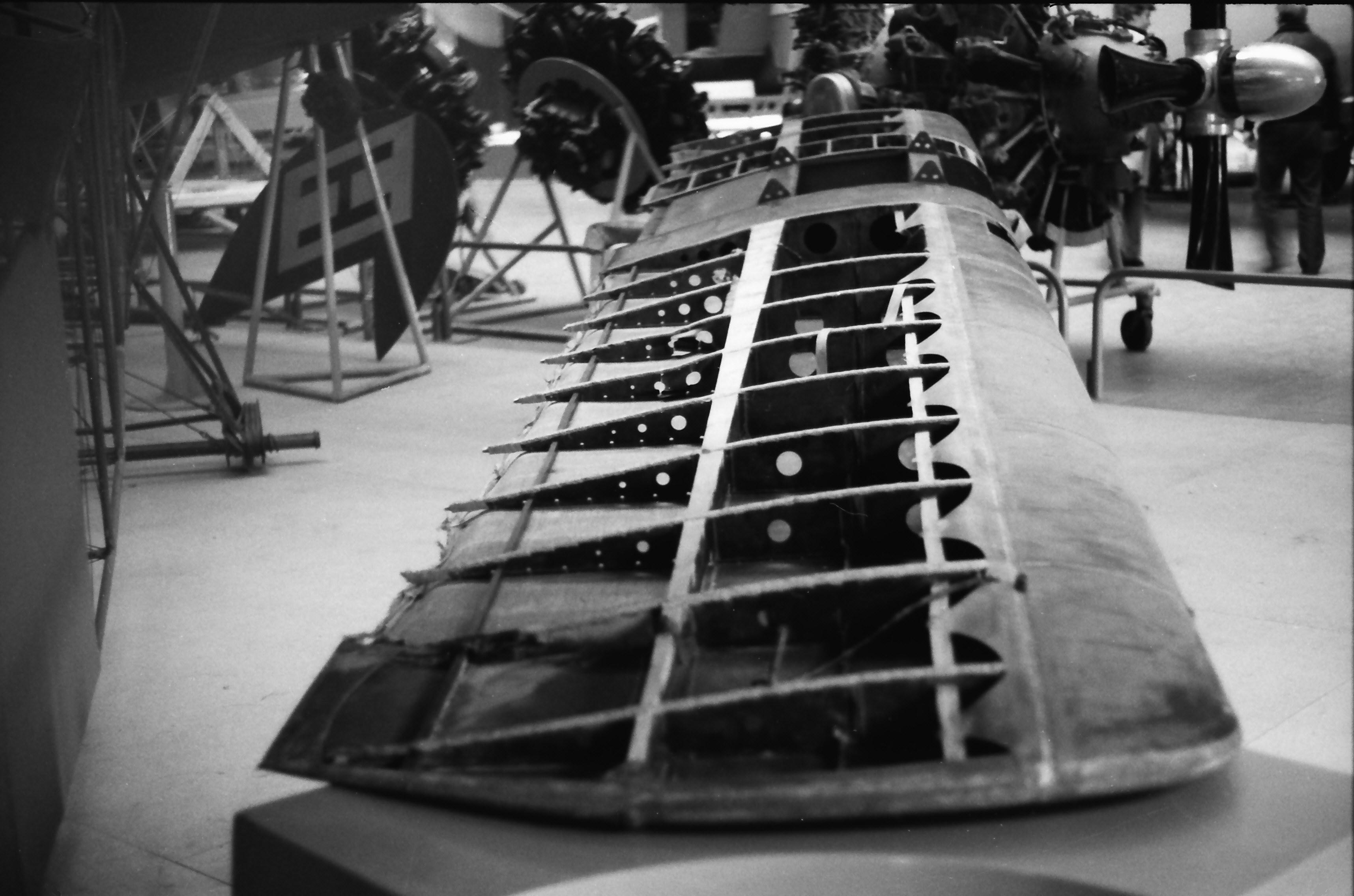 Fokker C.I lower wing